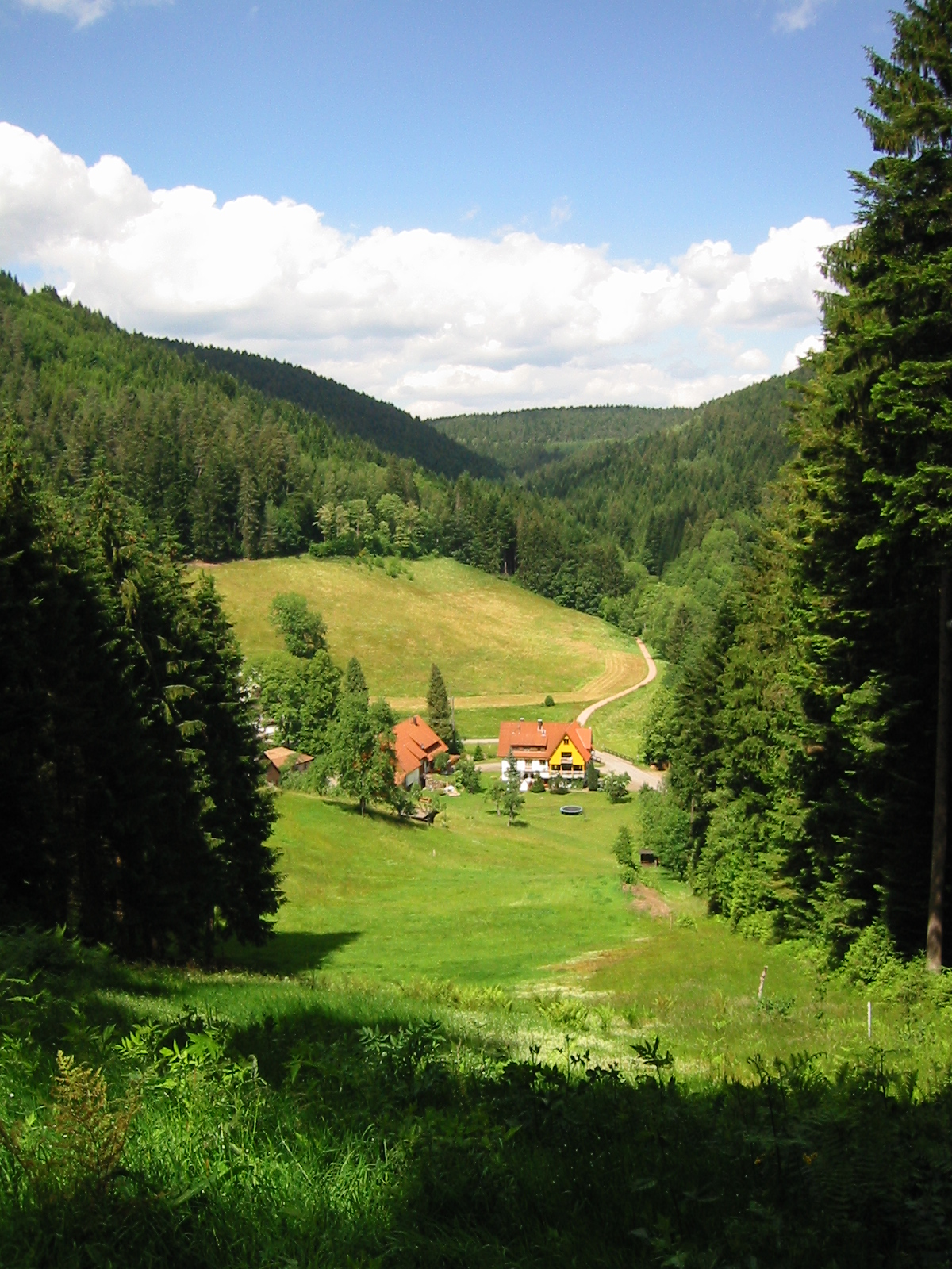 Blick vom Katzensteig nach Norden auf die Obere Muehle in Ehlenbogen